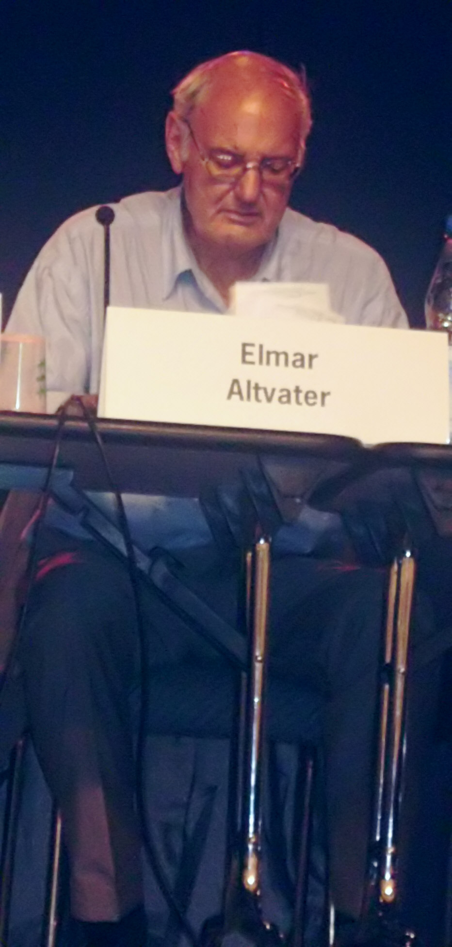 Elmar Altvater auf dem DEKT 2007 in Köln